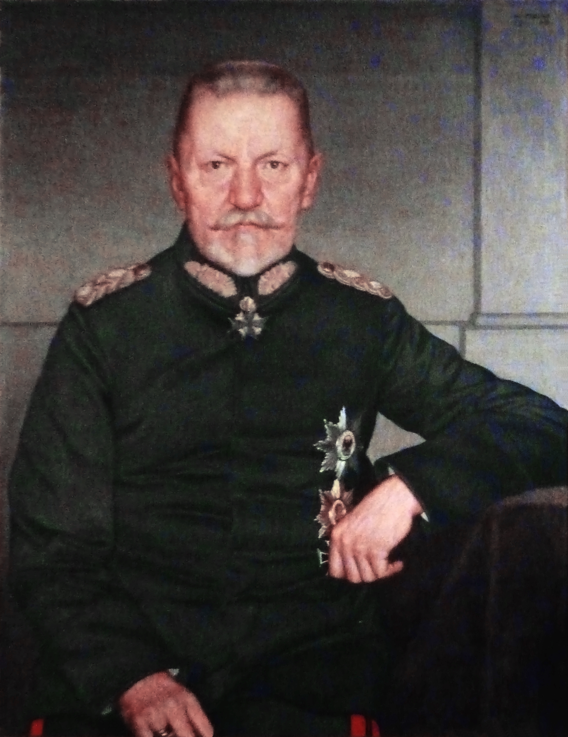 Porträt von Max von Gallwitz in der Historischen Kaufhalle Freiburg